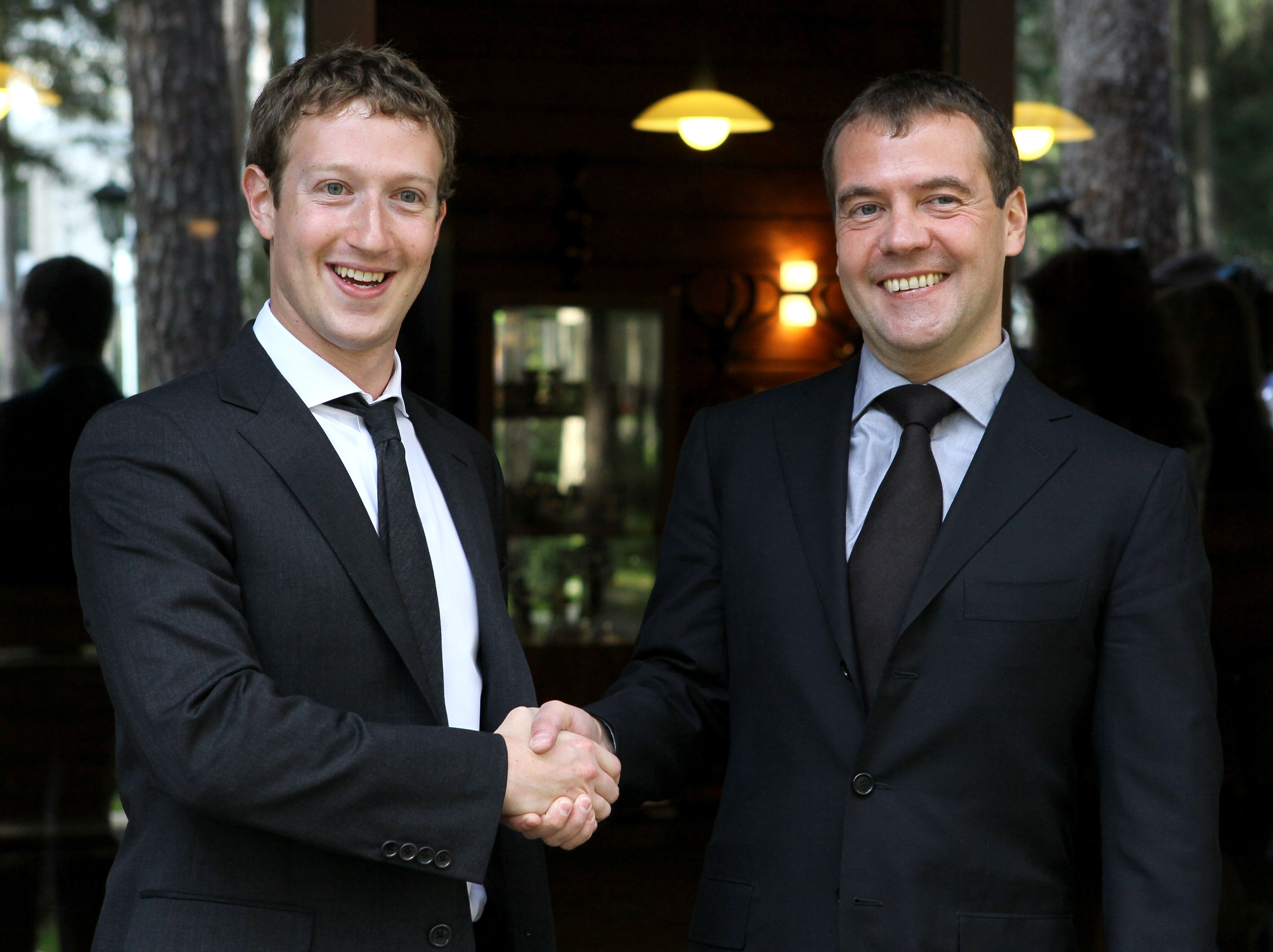 Дмитрий Медведев провёл встречу с президентом и основателем компании Facebook Марком Цукербергом